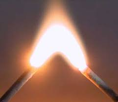 sads